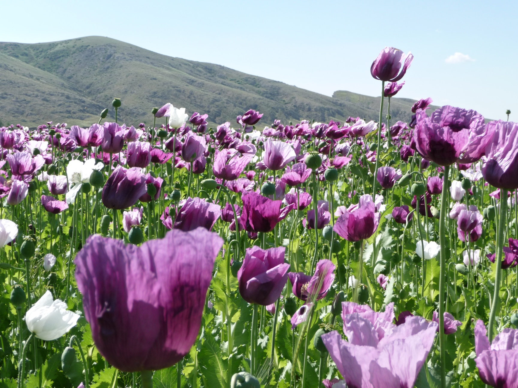 plantaciones de adormideras